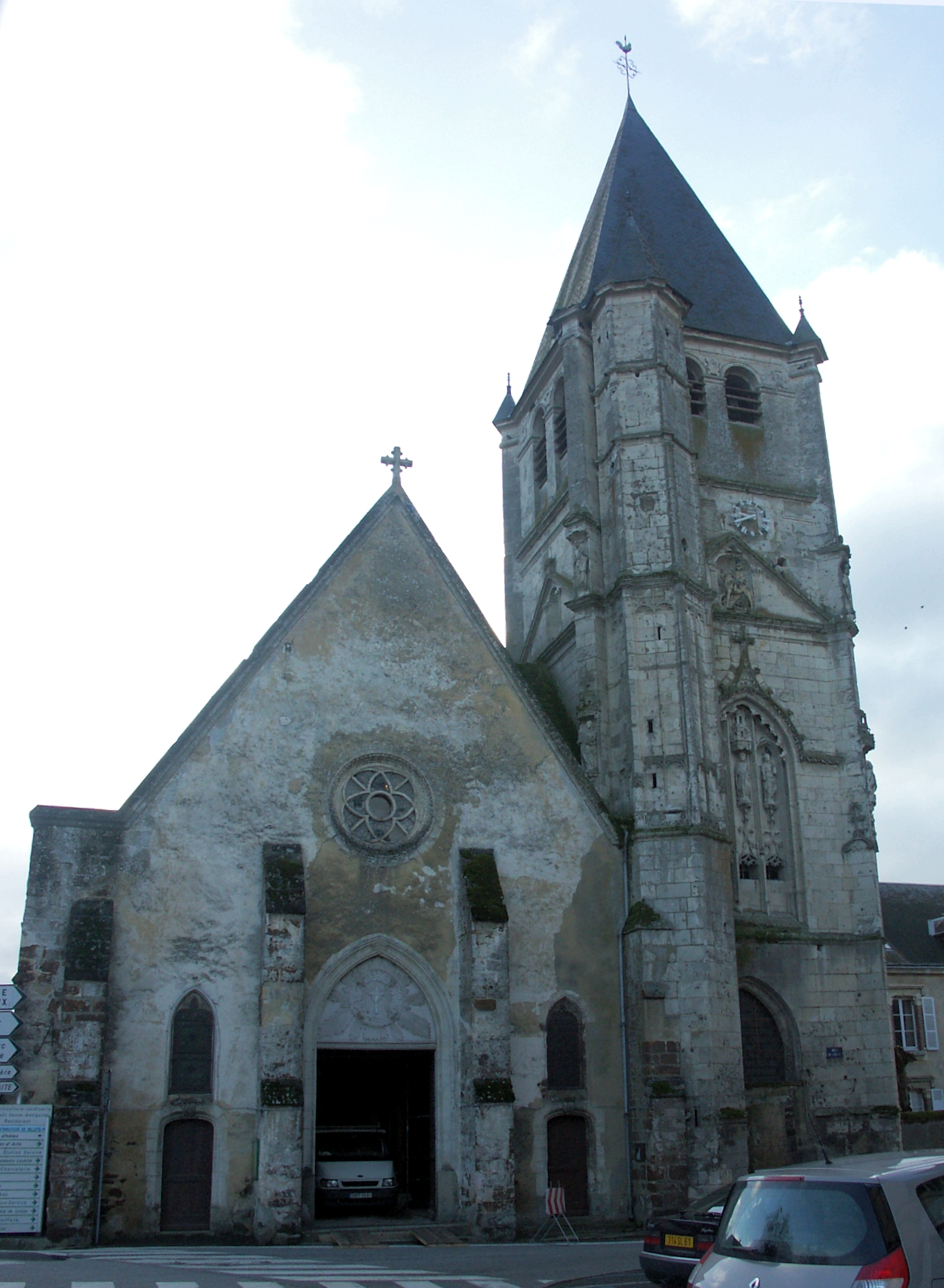 15e et16e. Façade ouest,et accolée au côté sud tour quadrangulaire avec escalier hors-œuvre, statuaire allégorique dans la fenêtre aveugle et statue de saint Martin sous l’horloge. CMH 1909